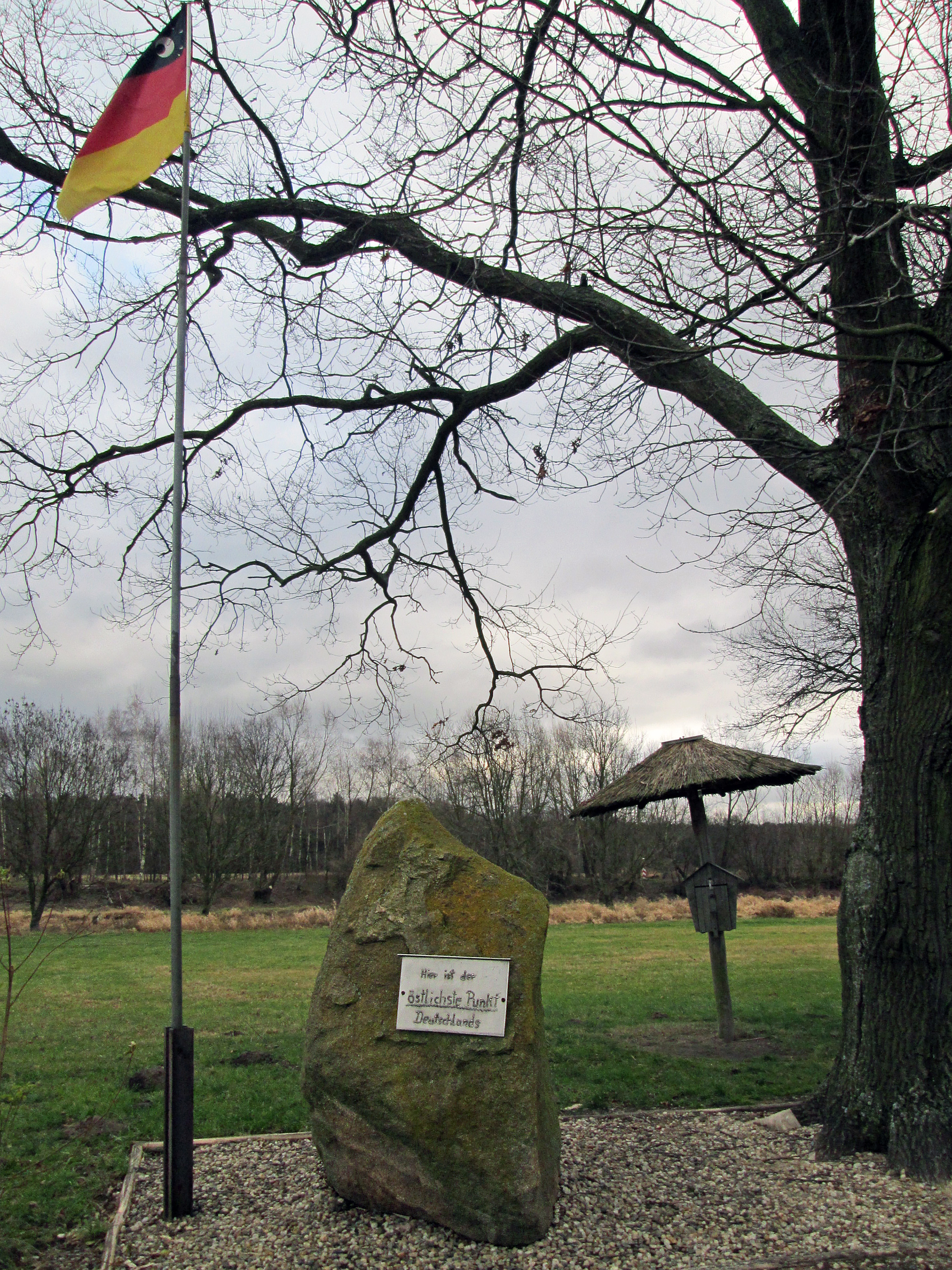 Östlichster Punkt Deutschlands zwischen Deschka und Zentendorf. Der Standort ist symbolisch gewählt, der tatsächliche Punkt befindet sich einige Meter weiter direkt an der Neiße.